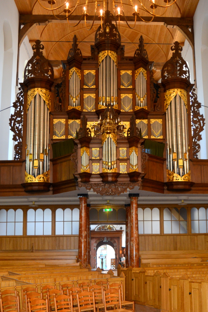 Martinytsjerke, Snits (Arp Schnitger oargel)